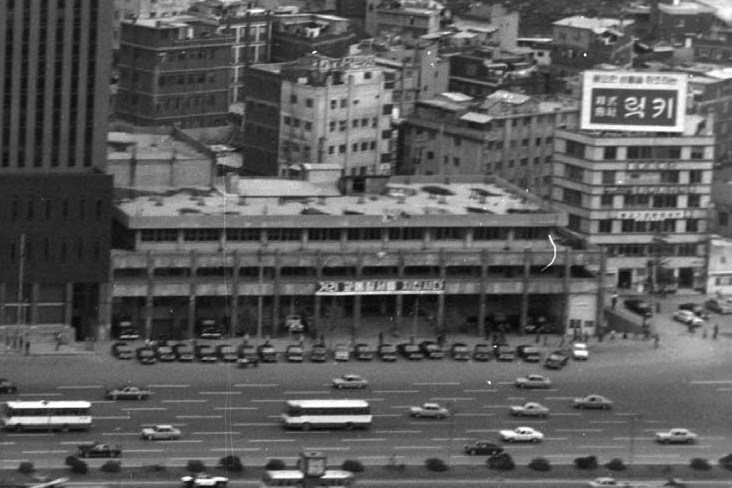 서울 남대문 경찰서